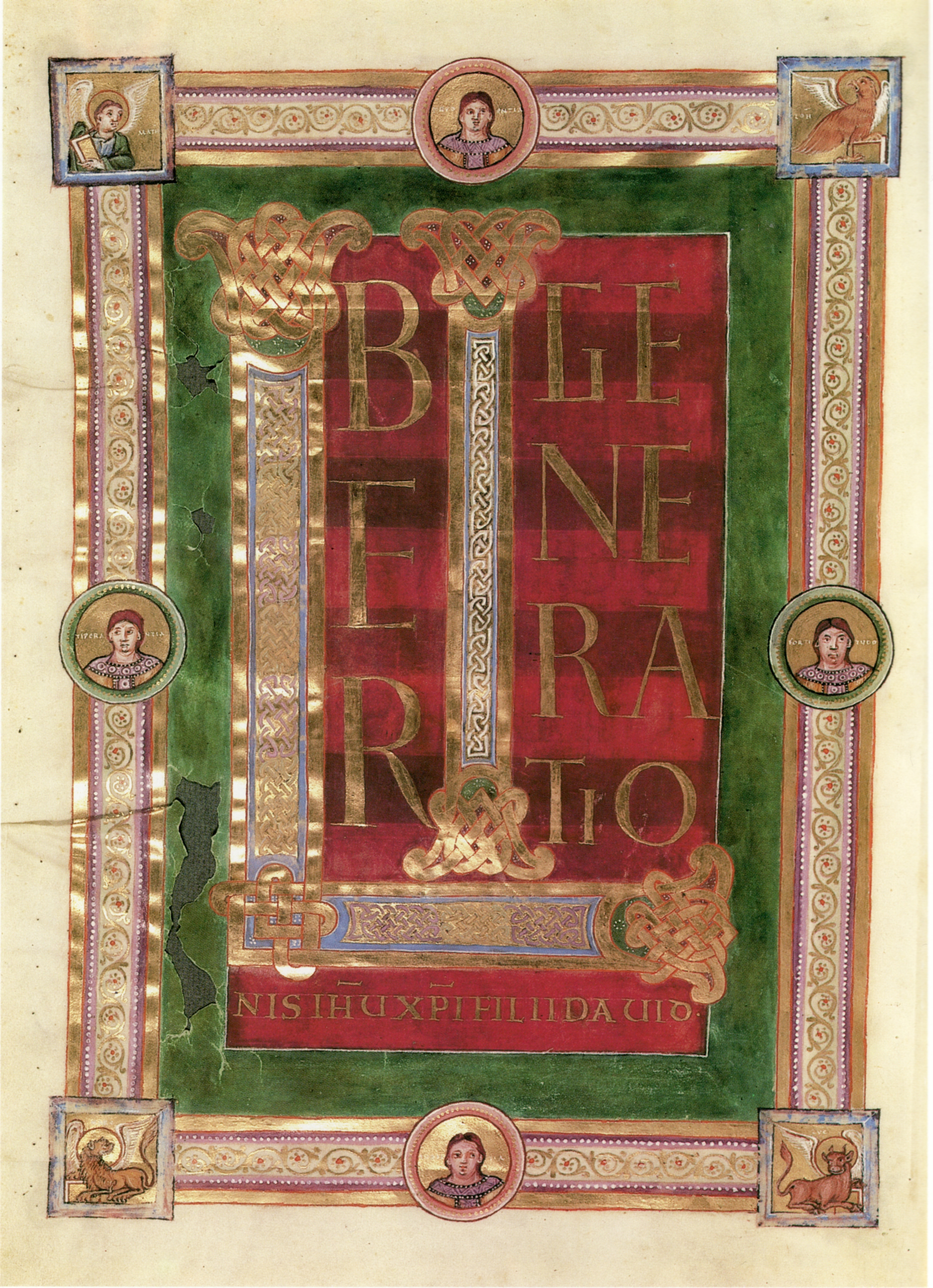 Fol. 16v. des Evangeliars der Sainte Chapelle (Paris, Nationalbibliothek, Lat. 8851). Initialzierseite zum Matthäusevangelium